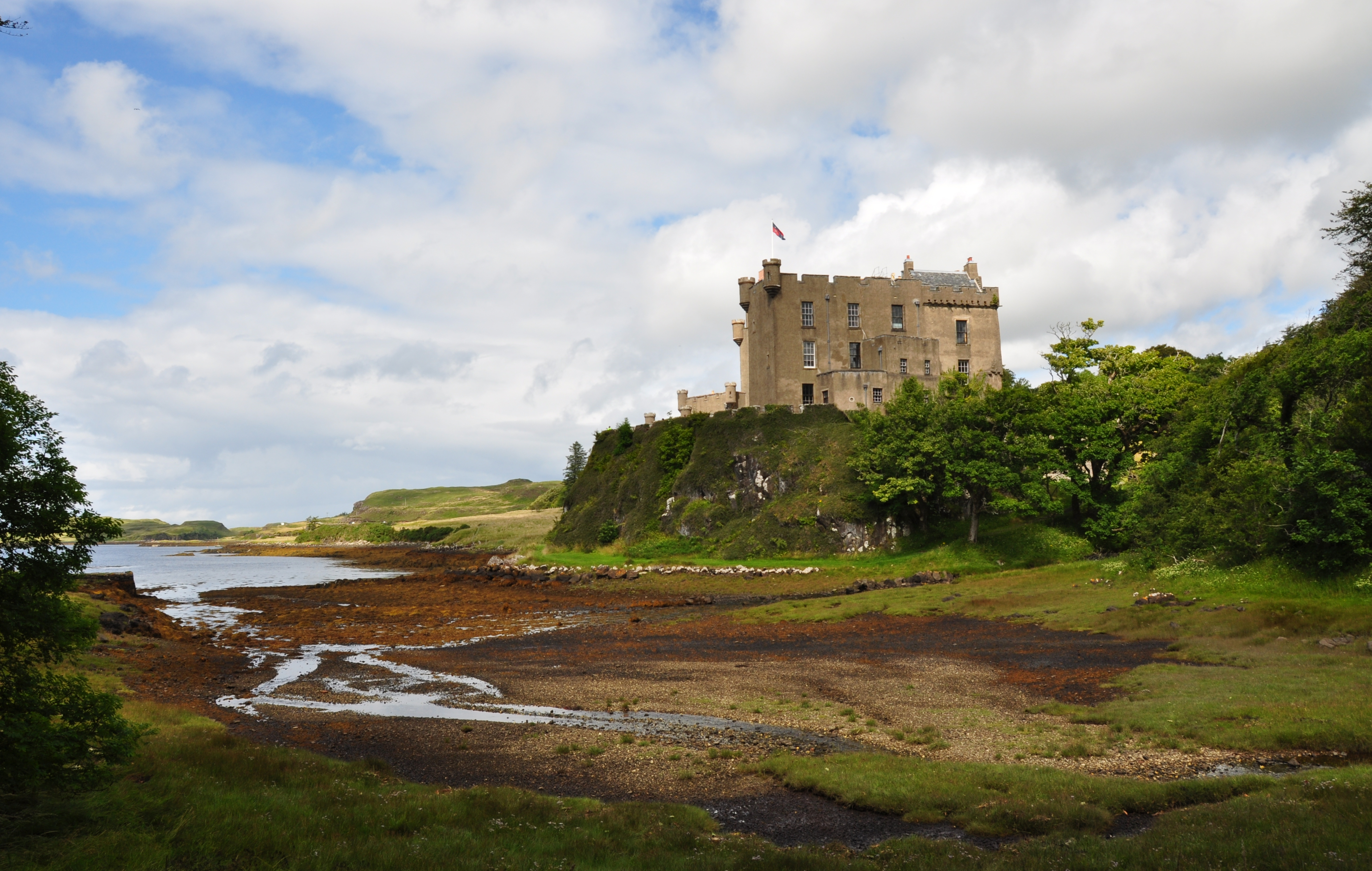 Dunvegan Castle during ebb